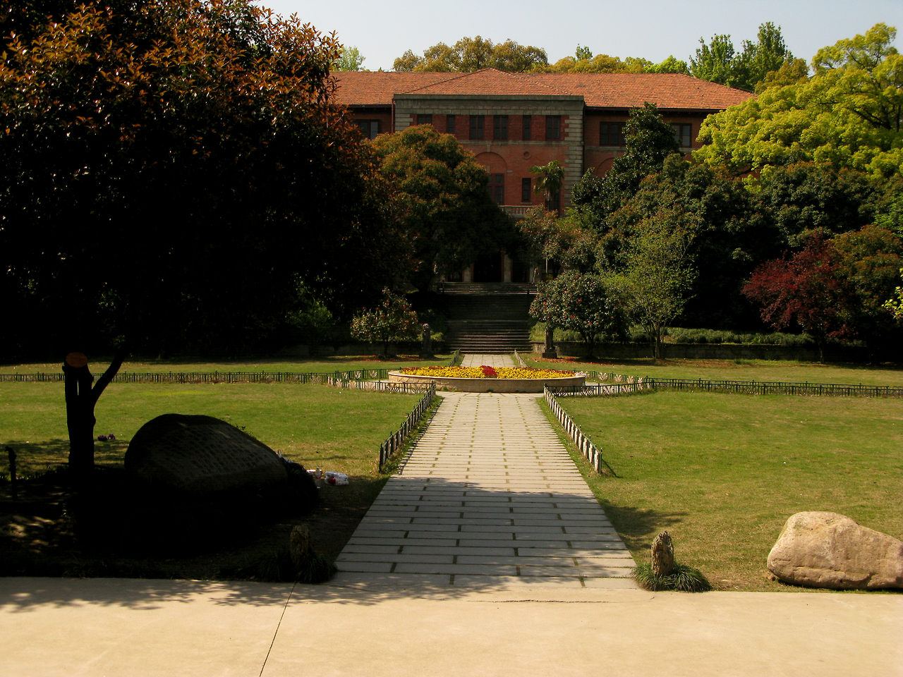 中文（中国大陆）: 杭州之江大学